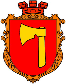 Герб села Топорів